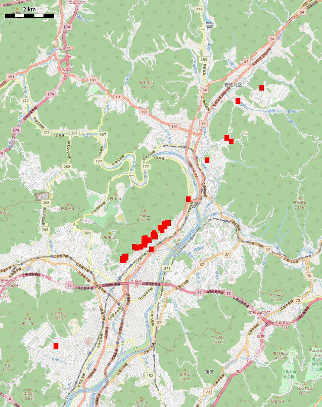 牛山素行. 2014年8月広島豪雨災害時の犠牲者の特徴と課題.を参考に2017年地図に書いたもの This map may be incomplete, and may contain errors. Don't rely solely on it for navigation.